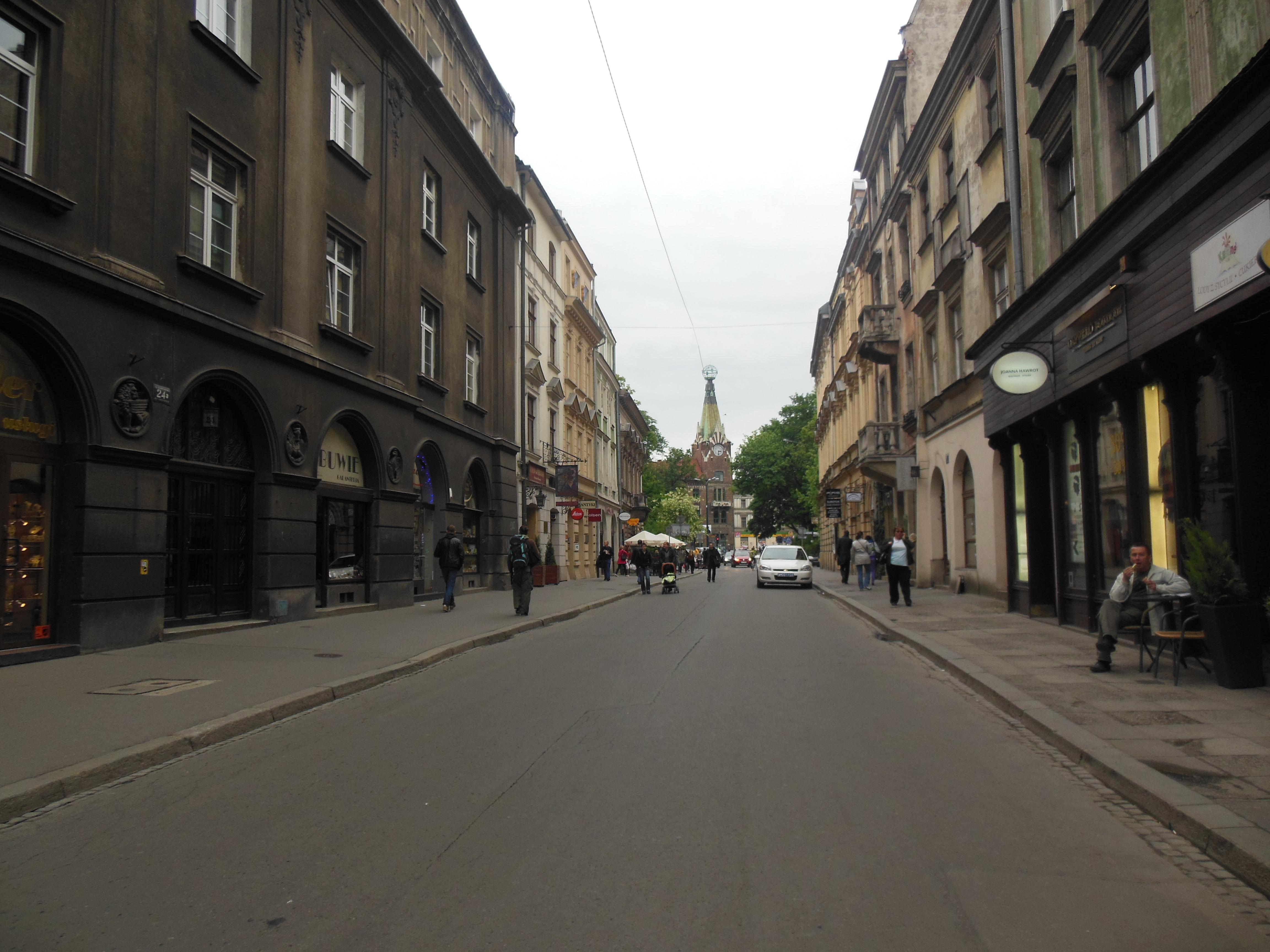 Ulica Sławkowska w Krakowie, widok na północ.